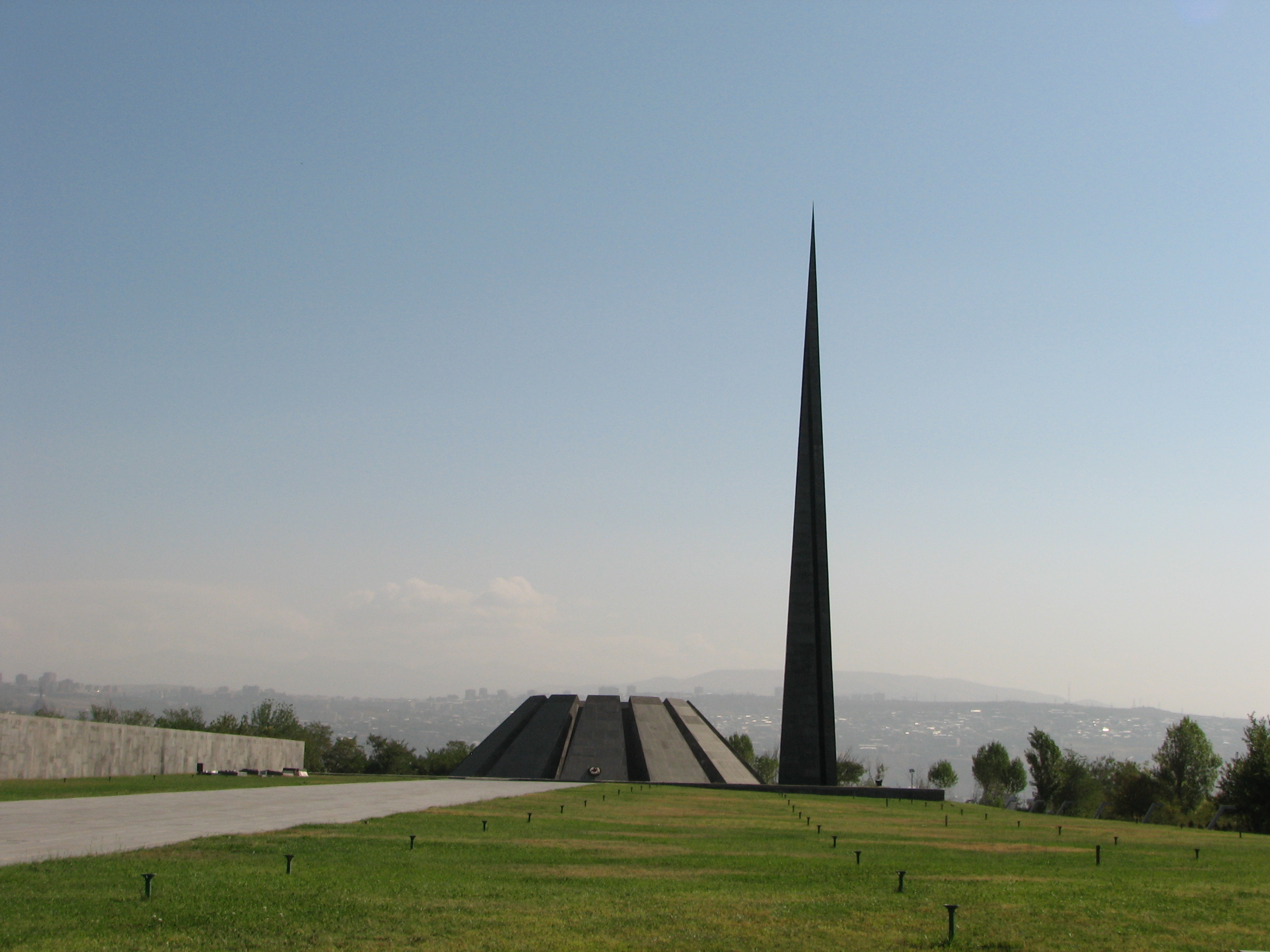 Armenian Genocide Museum-Institute in Yerevan, Armenia המוזיאון לרצח העם הארמני בירוואן בירת ארמניה האנדרטה והאובליסק בשטח המוזיאון